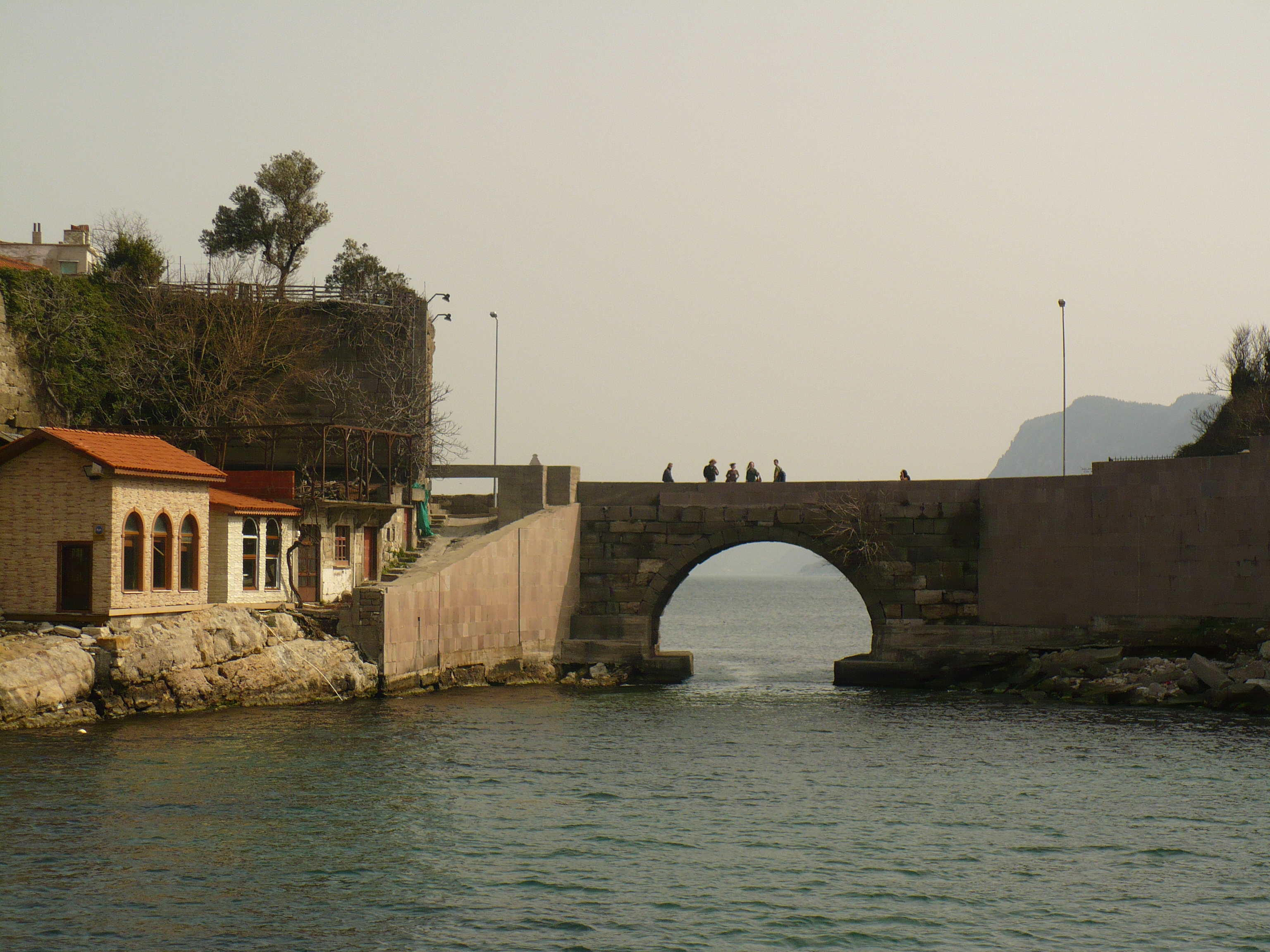 Amasra'dan bir görüntü